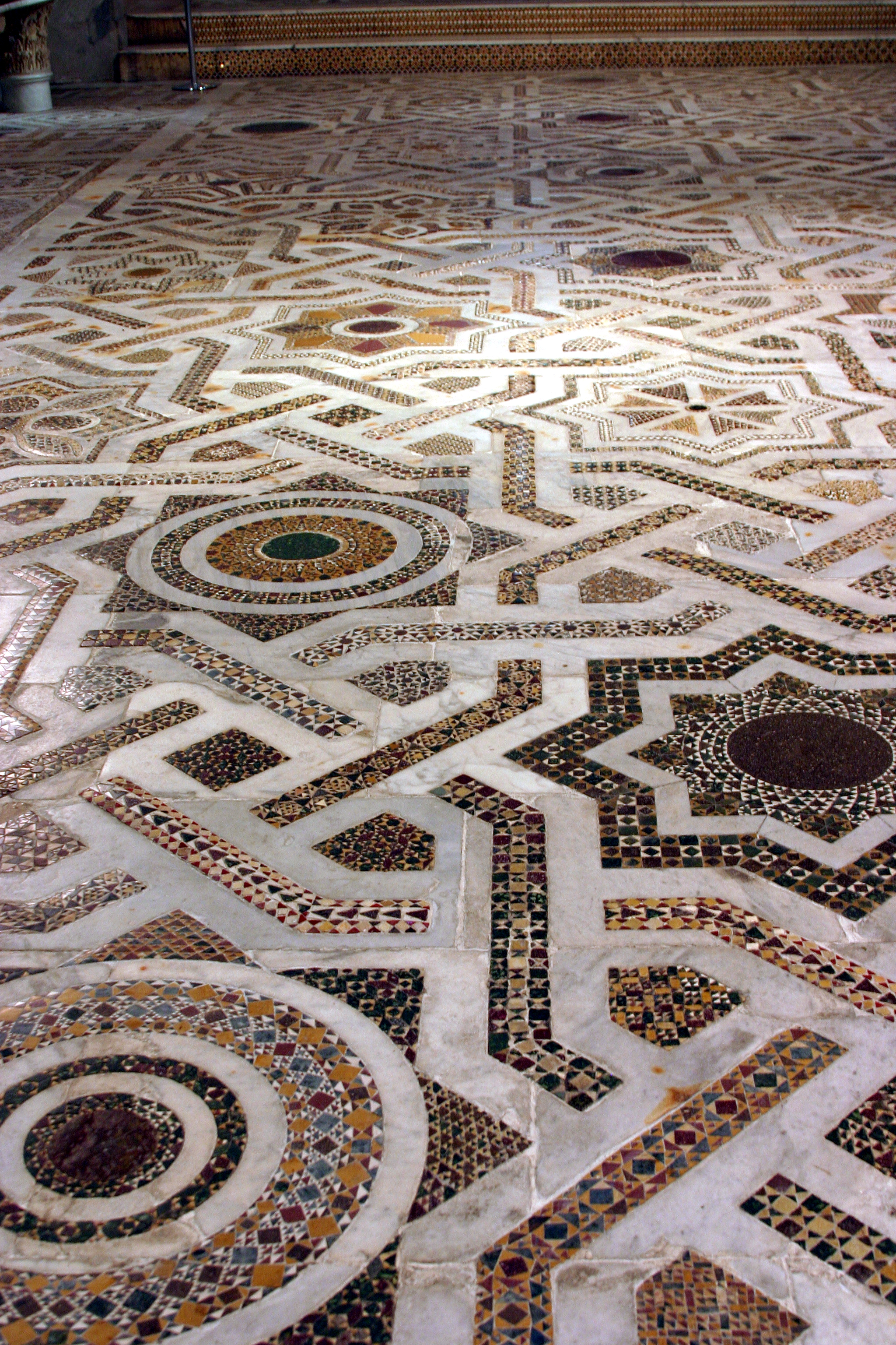 Cathedral of Monreale